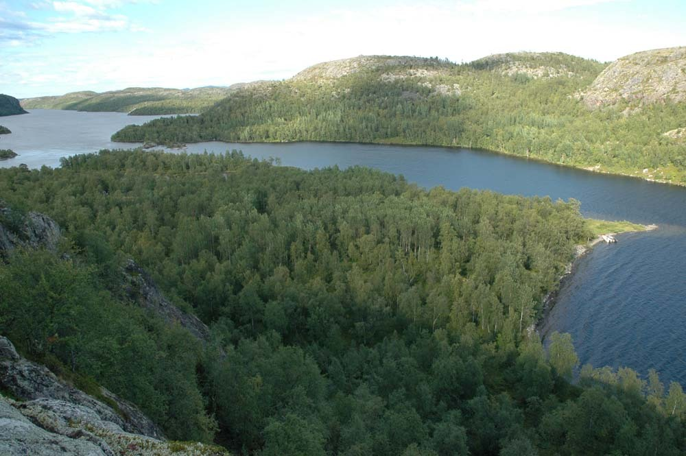 Harefossen i pasvikelva, russland, grense, borderzone between russia and norway. Borderriver